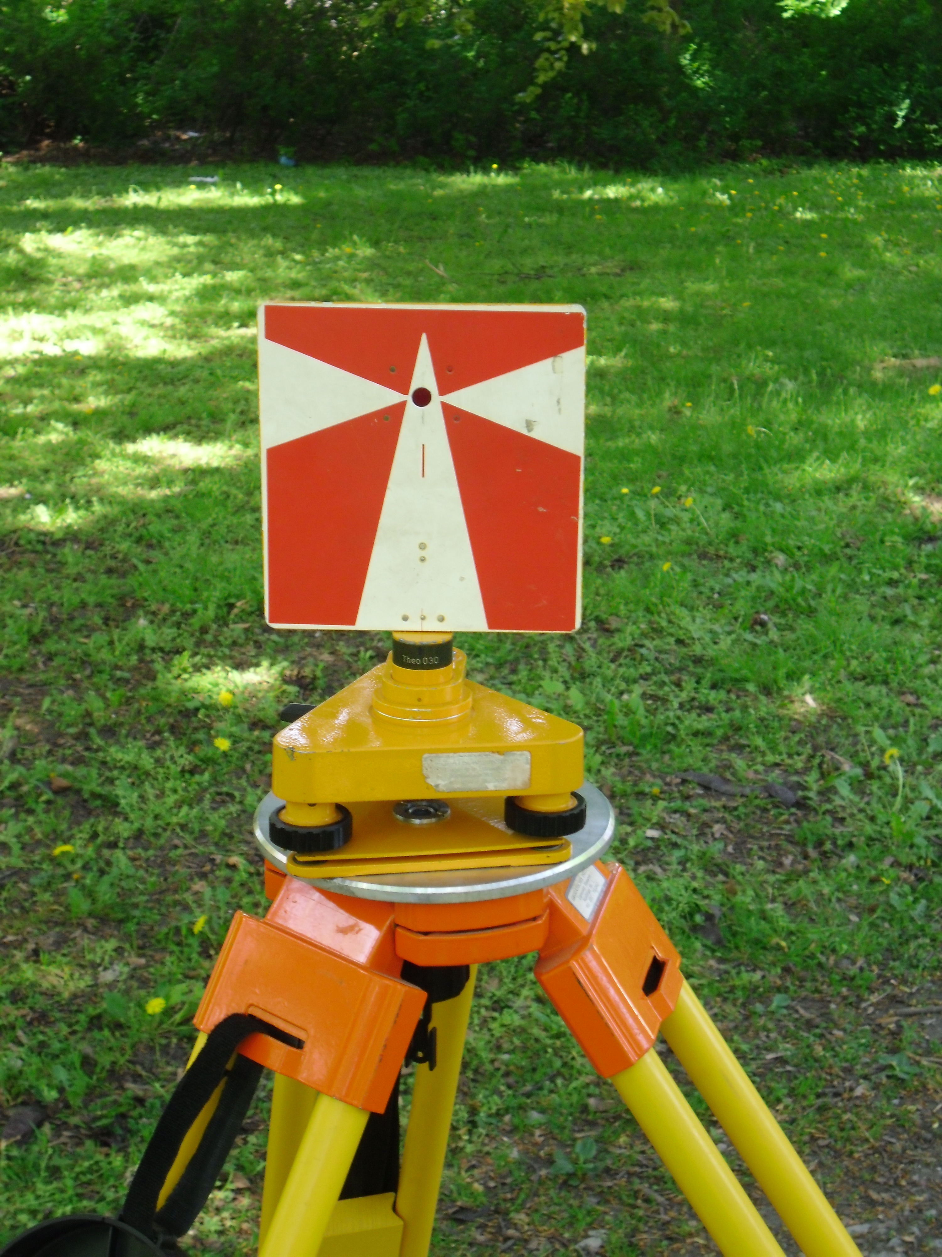 Zieltafel aus der Geodäsie für Winkelmessung mit dem Theodoliten